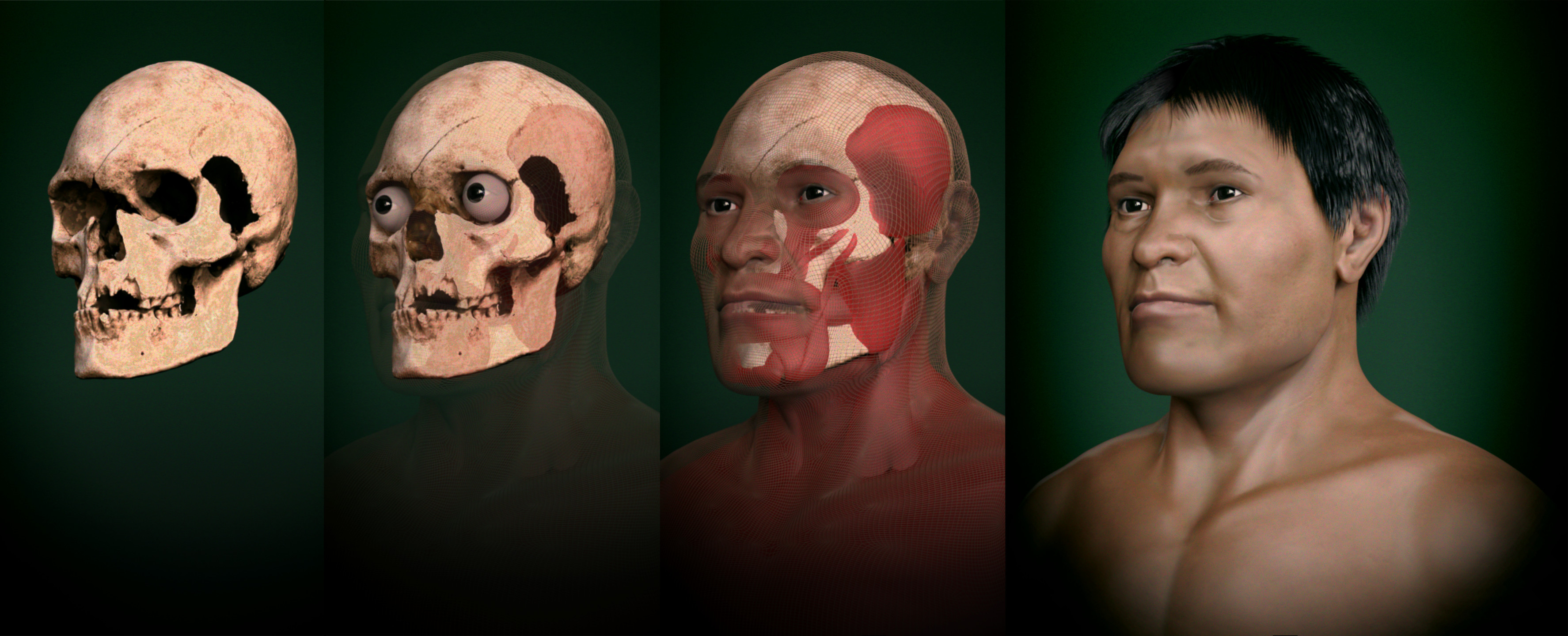 O processo de reconstrução facial do Sambaqui de 5000 anos foi fruto de uma parceria envolvendo o IPHAN DF, o 3D designer Cícero Moraes e Cir. Dentista Everton da Rosa. Inicialmente foram efetuadas 32 fotografias do crânio em um círculo completo. Estas fotos foram enviadas a um algoritmo computacional que digitalizou a peça em 3 dimensões pela técnica de fotogrametria. Uma vez que o crânio estava virtualizado, o artista pode posicionar uma série de pinos, conhecidos como marcadores de espessura de tecido mole. Estes marcadores informa qual a espessura da pele em determinados pontos do crânio. Junto a estes dados foram modelados os músculos principal e a pele moldou-se sobre os pinos e músculos com o auxílio da escultura digital. Ao final pigmentou-se a pele e os cabelos foram inseridos.